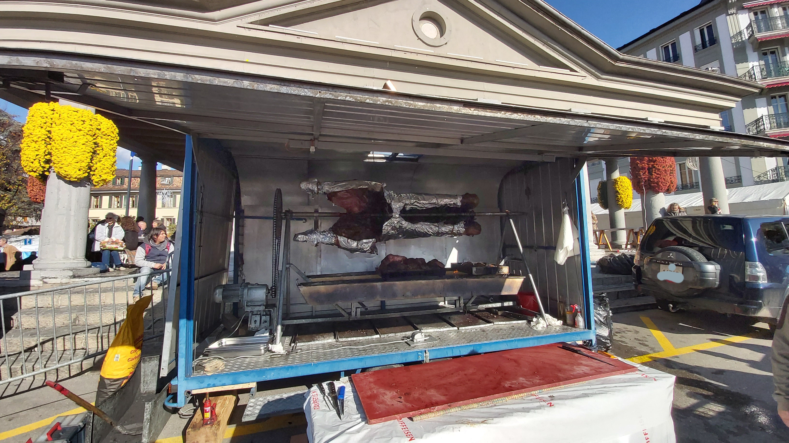 Broche avec le bœuf cuit depuis la veille